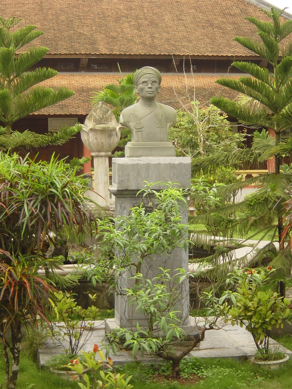 Tượng linh mục Phero Trần Lục ở nhà thờ Đá Phát Diệm